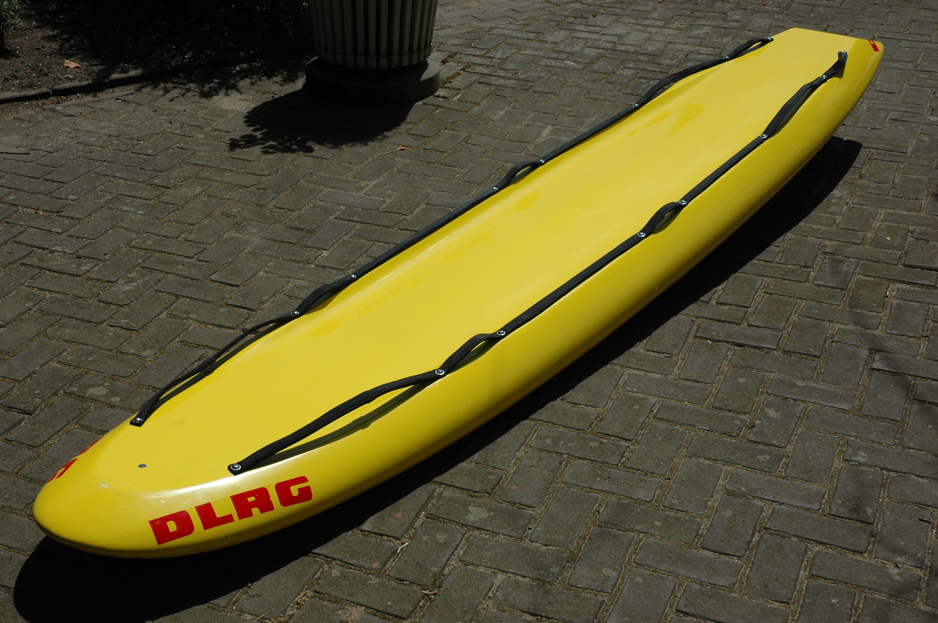 Rettungsbrett aus dem Wasserrettungsdienst. Oberseite mit Halteband